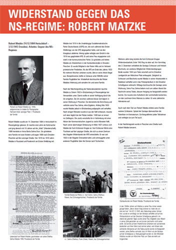 Robert Matzke Tafel "Widerstand gegen Das NSRegime" in der Robert Matzke Str.16 (RM16)